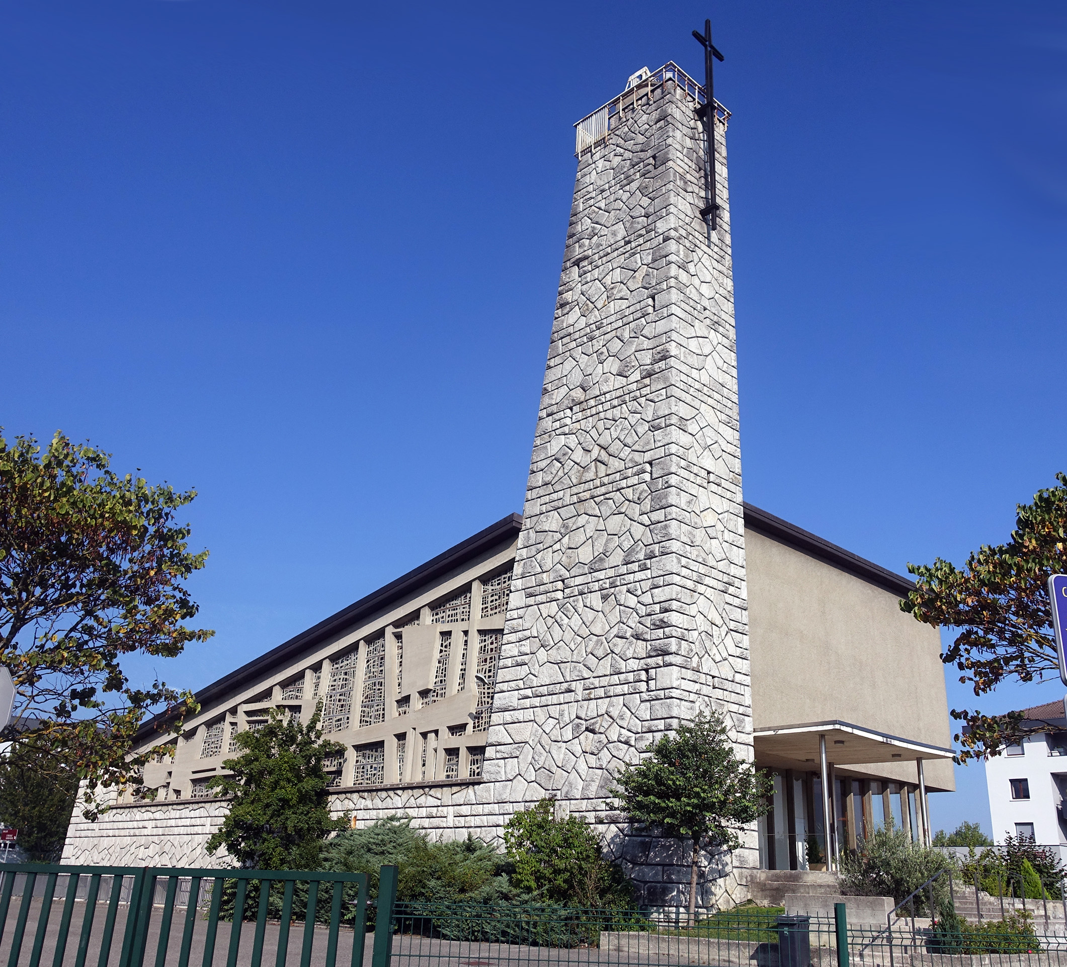 Église Sainte-Geneviève des Bressis, Cran-Gevrier.